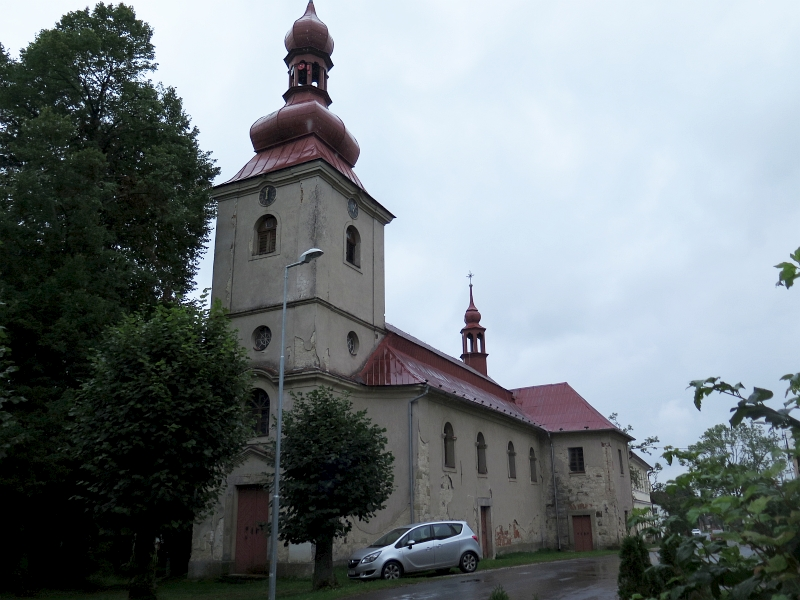 Kostel Nanebevzetí Panny Marie, Kohoutov (okres Trutnov).